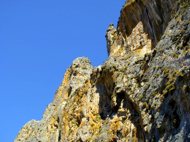 Kalymnos, Sektor Arhi